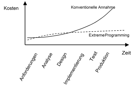 Zusammenhang zwischen Änderungskosten und dem Zeitpunkt einer Änderung